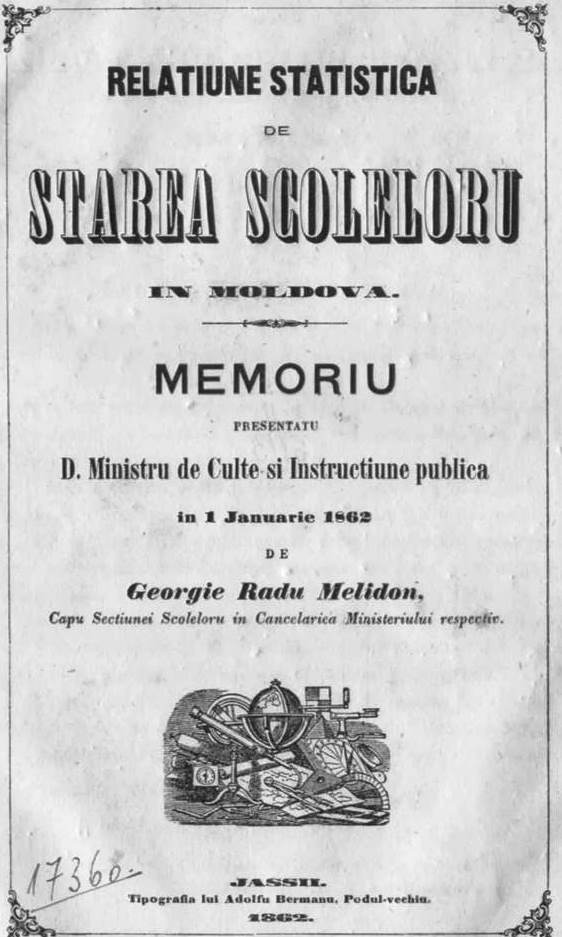 Couverture du rapport de 1862Română: Pagina de titlu a lucrării lui George Radu Melidon „Relațiune statistică de starea școleloru în Modova”